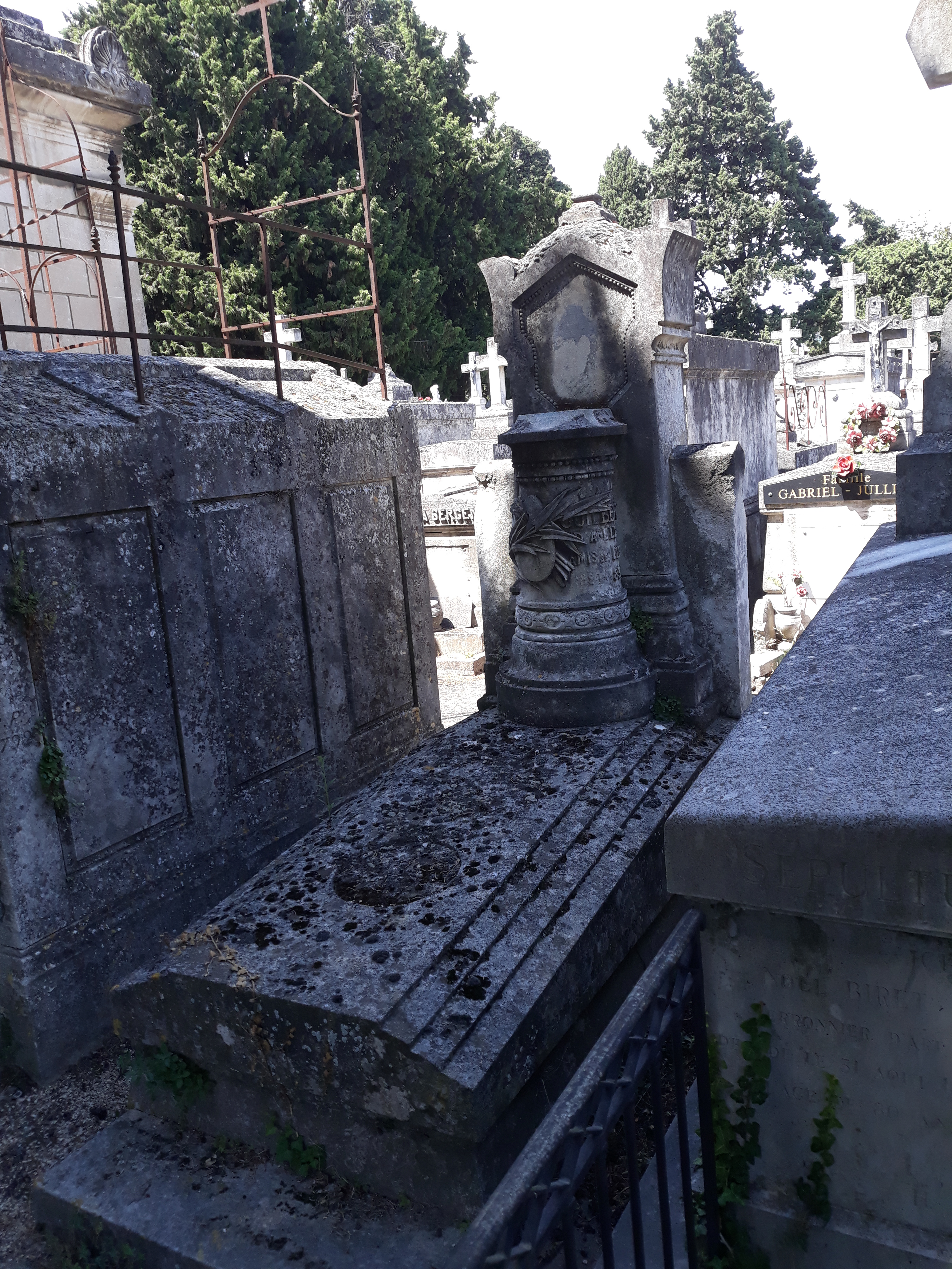 Das Grab des französischen Kunstmalers Charles Guilbert d`Anelle auf dem Cimetière Saint-Véran in Avignon.